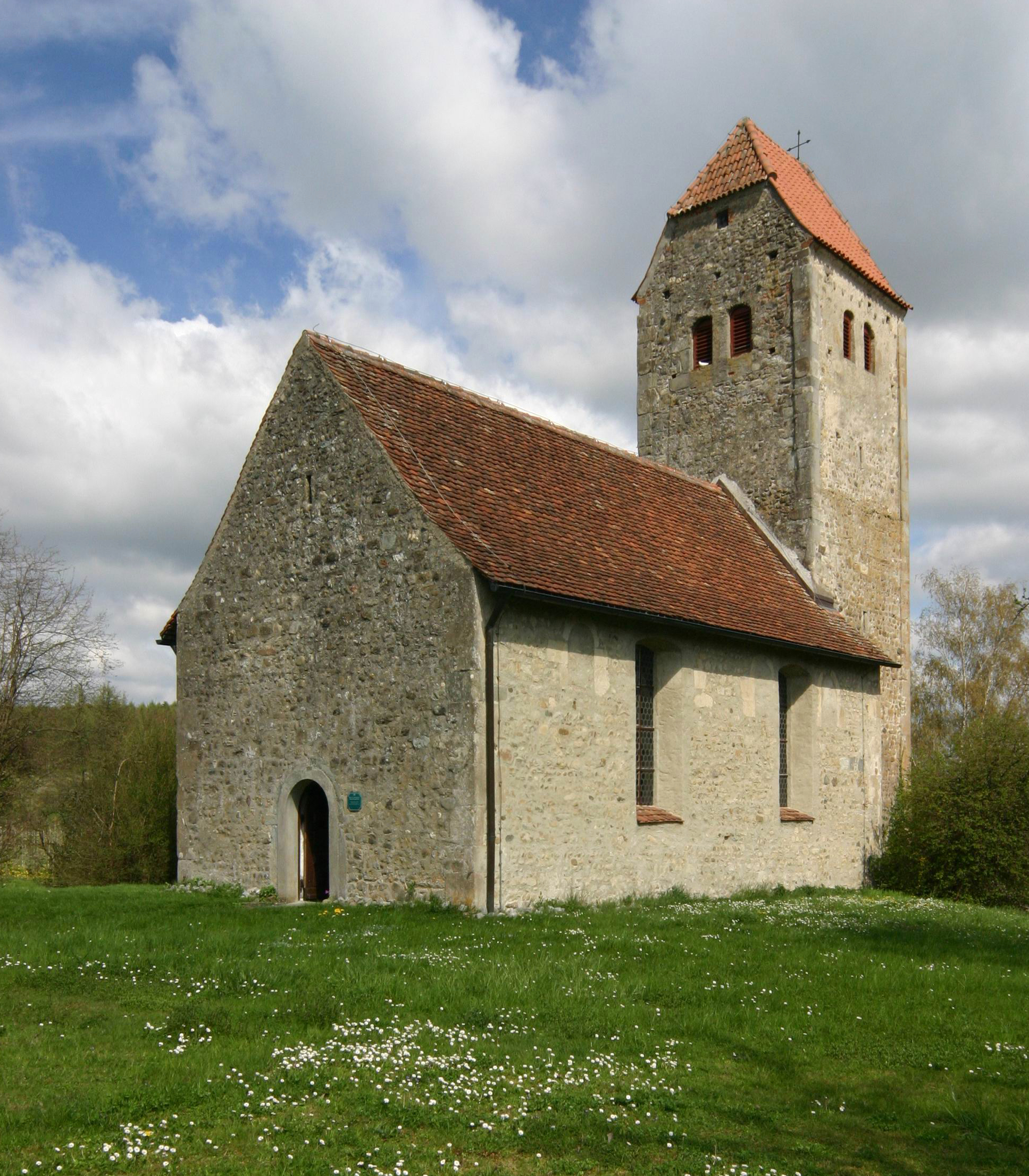 Romanische Kirche St. Oswald und St. Otmar, Immenstaad-Frenkenbach, 12. Jhd.